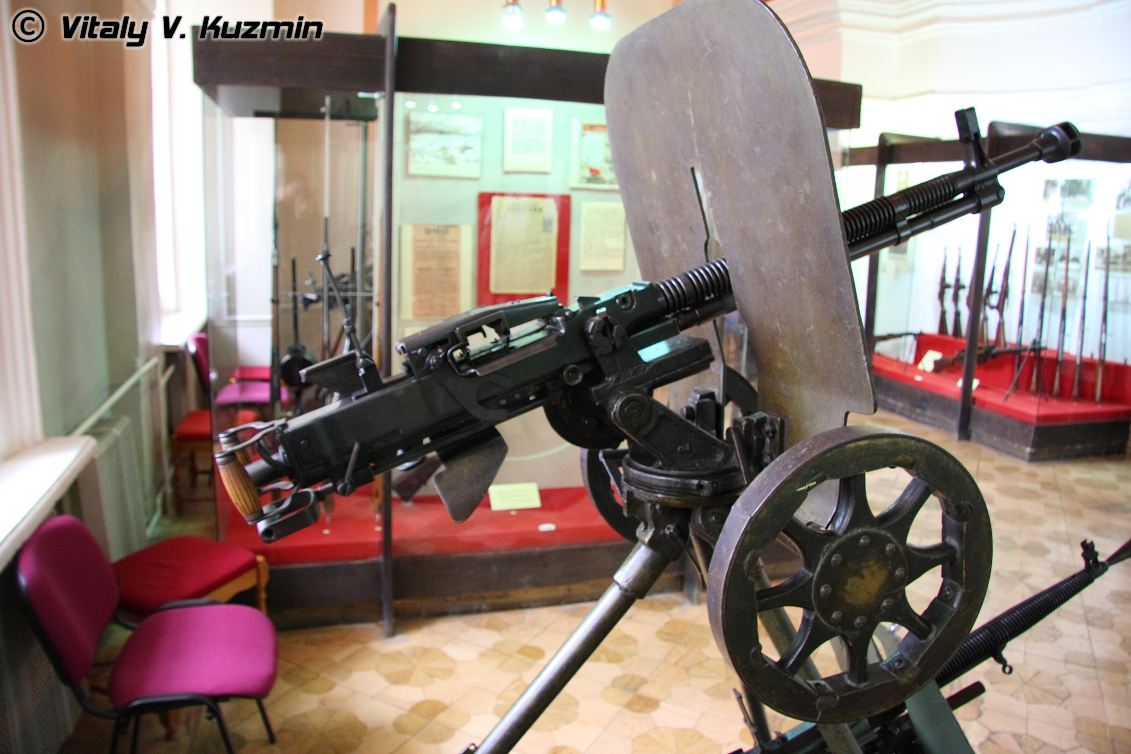 ДШКМ и ДС-39 (DShKM and DS-39)